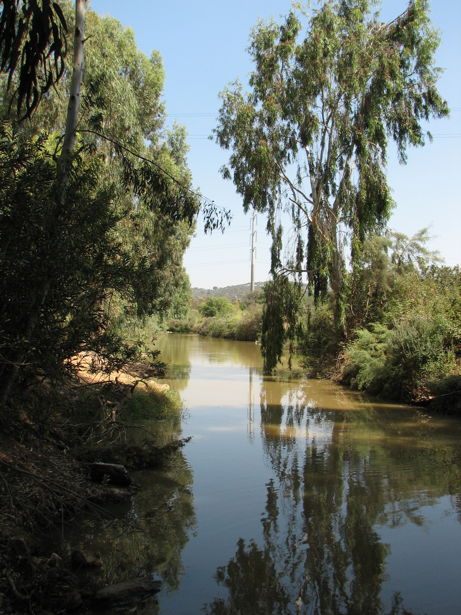 The Valleys Park is on the bank of the Kishon river near Kiryat Tivon in Israel. פארק העמקים שוכן ליד צומת העמקים משני צידי נחל קישון